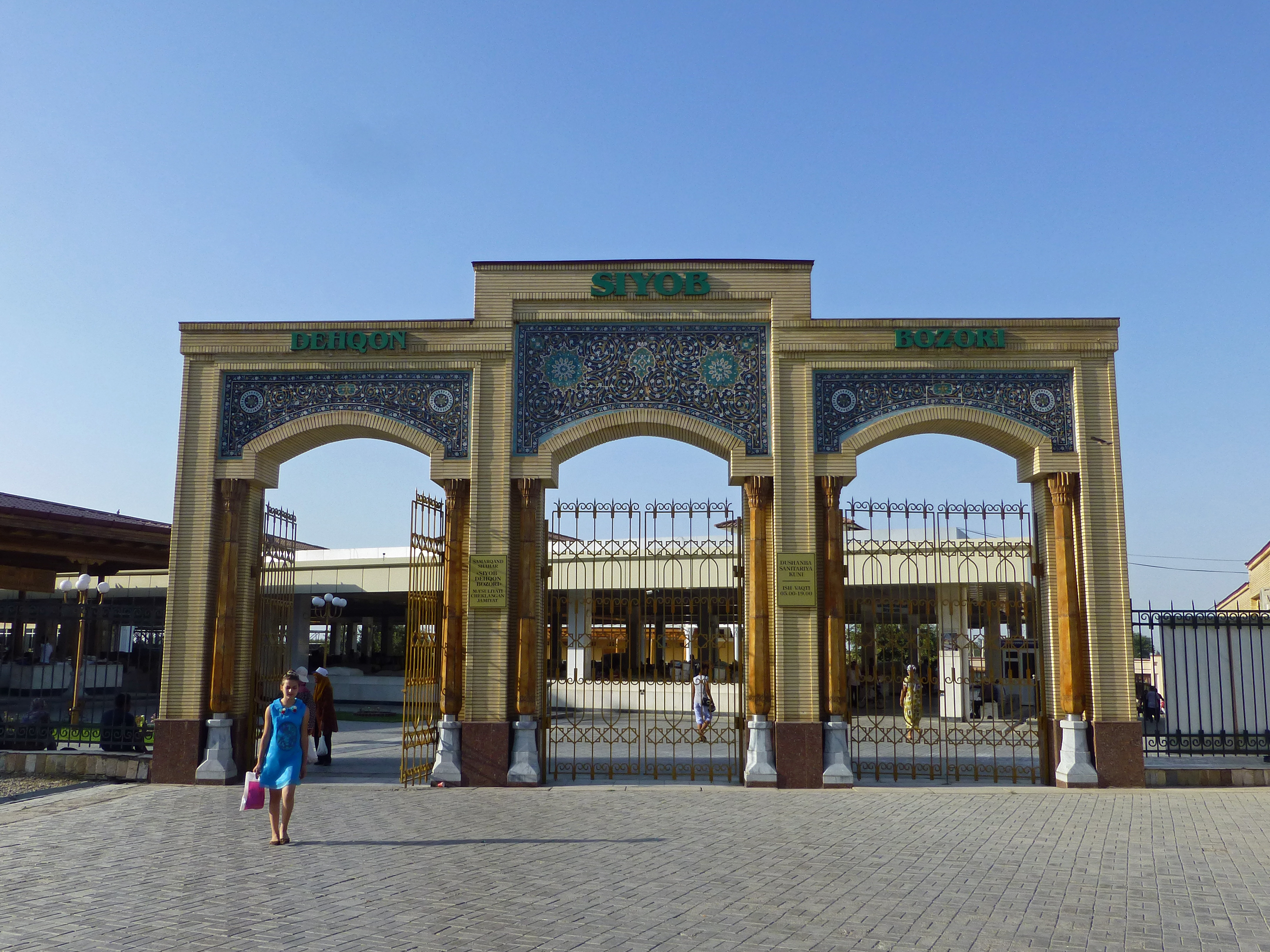 Siyob Bazaar, le grand marché de Samarcande (Ouzbékistan)